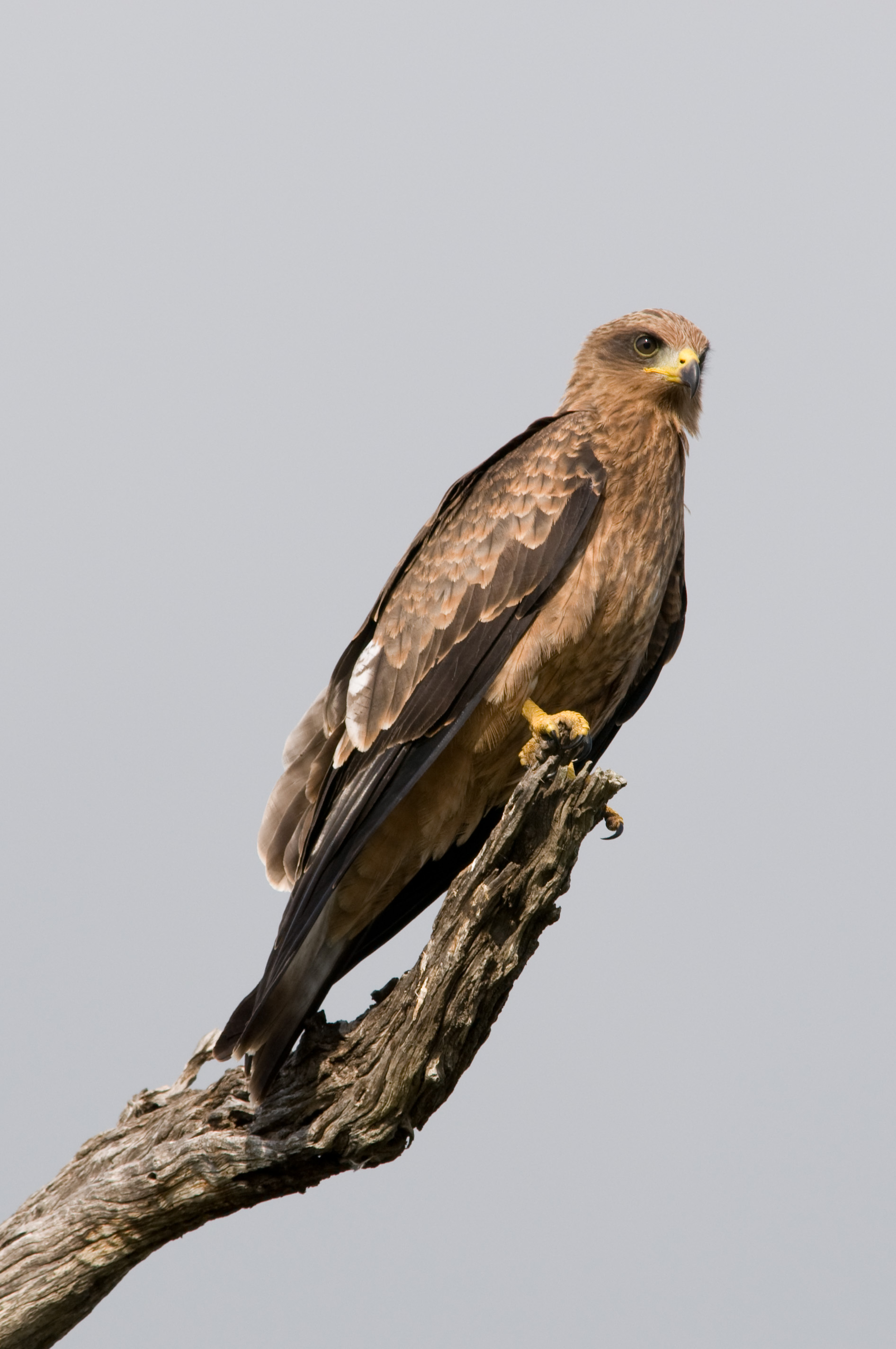 Black Kite (Milvus migrans), Kruger National Park.